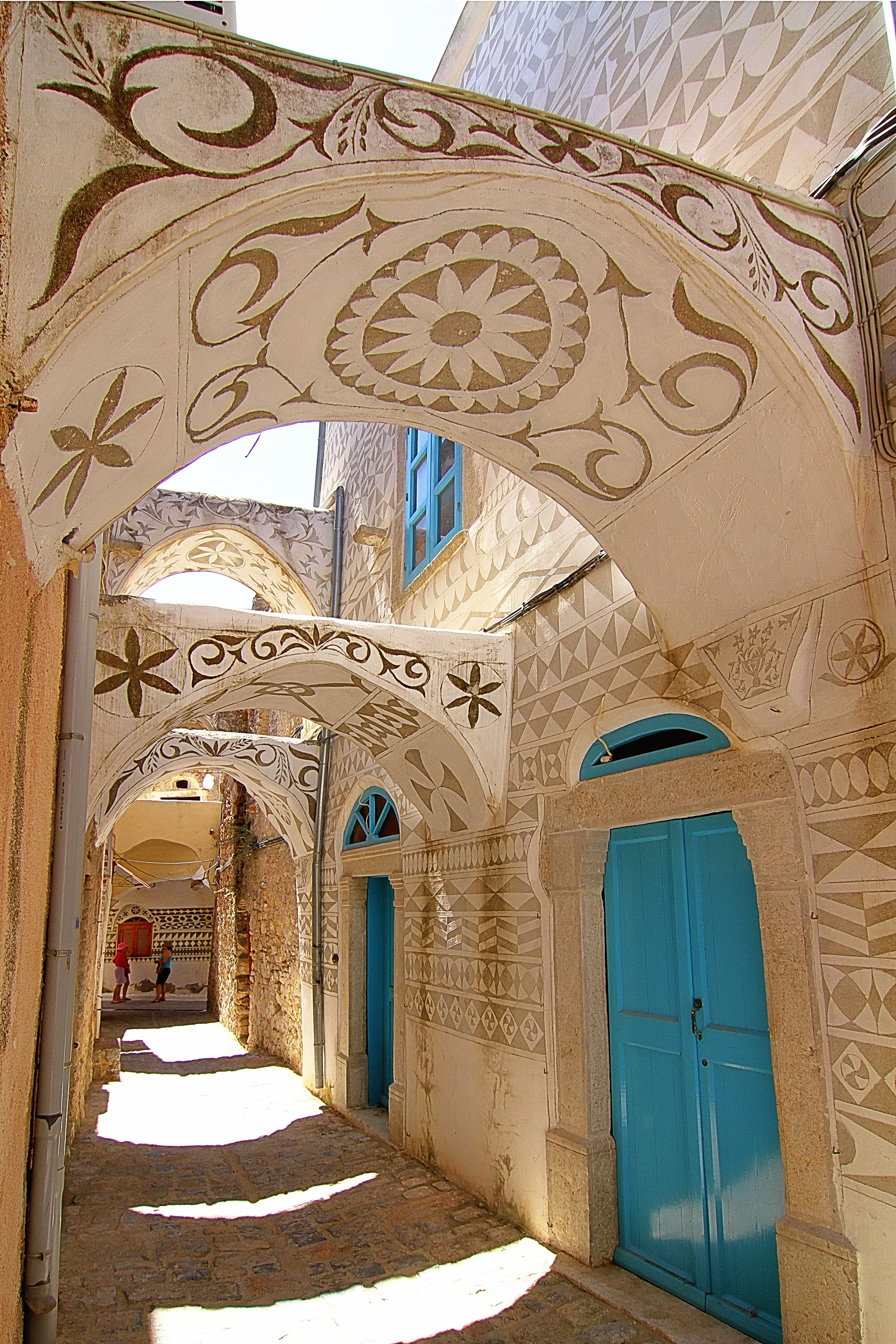 Πυργί«Πυργί»